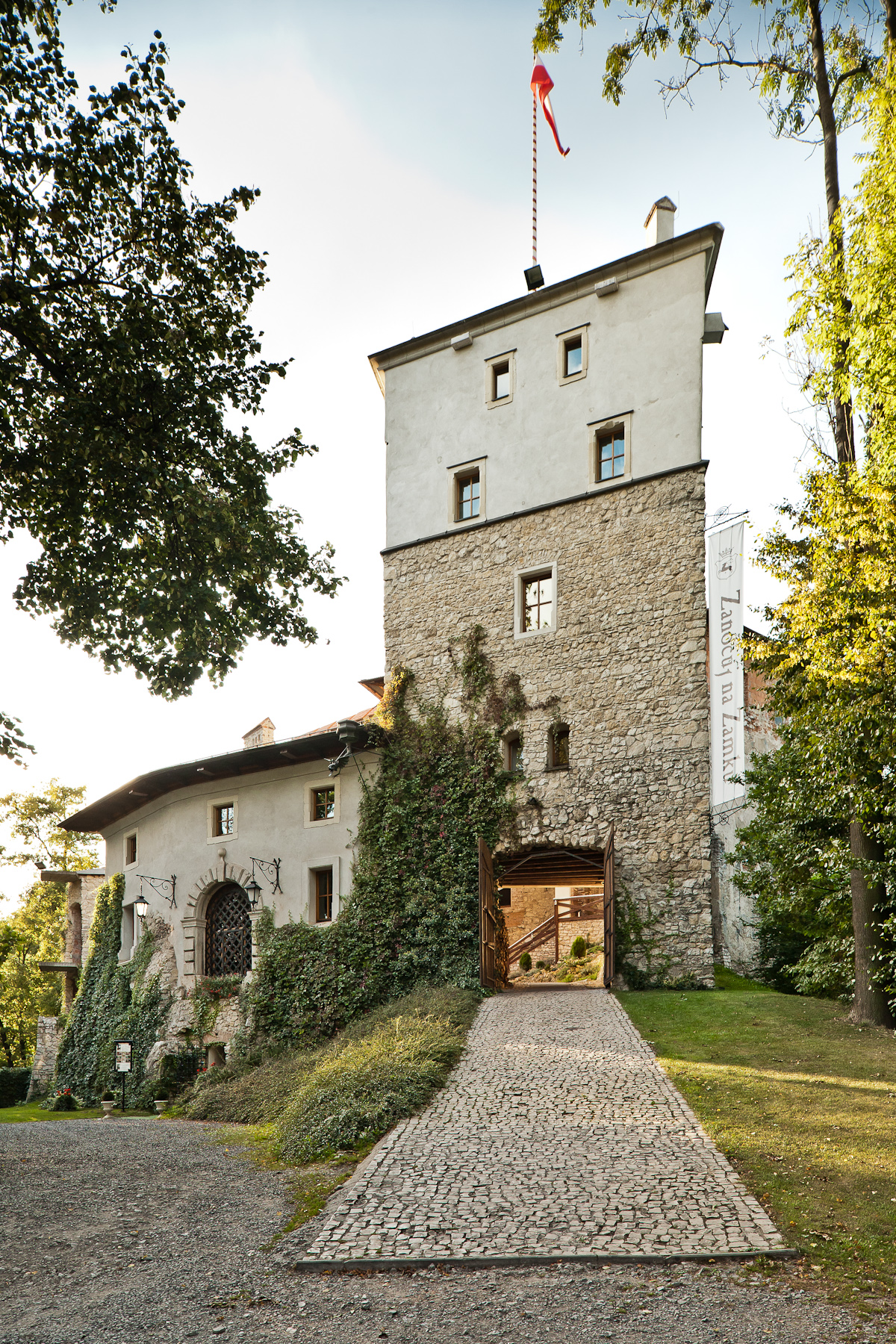 Zamek, Korzkiew - frontowa elewacja